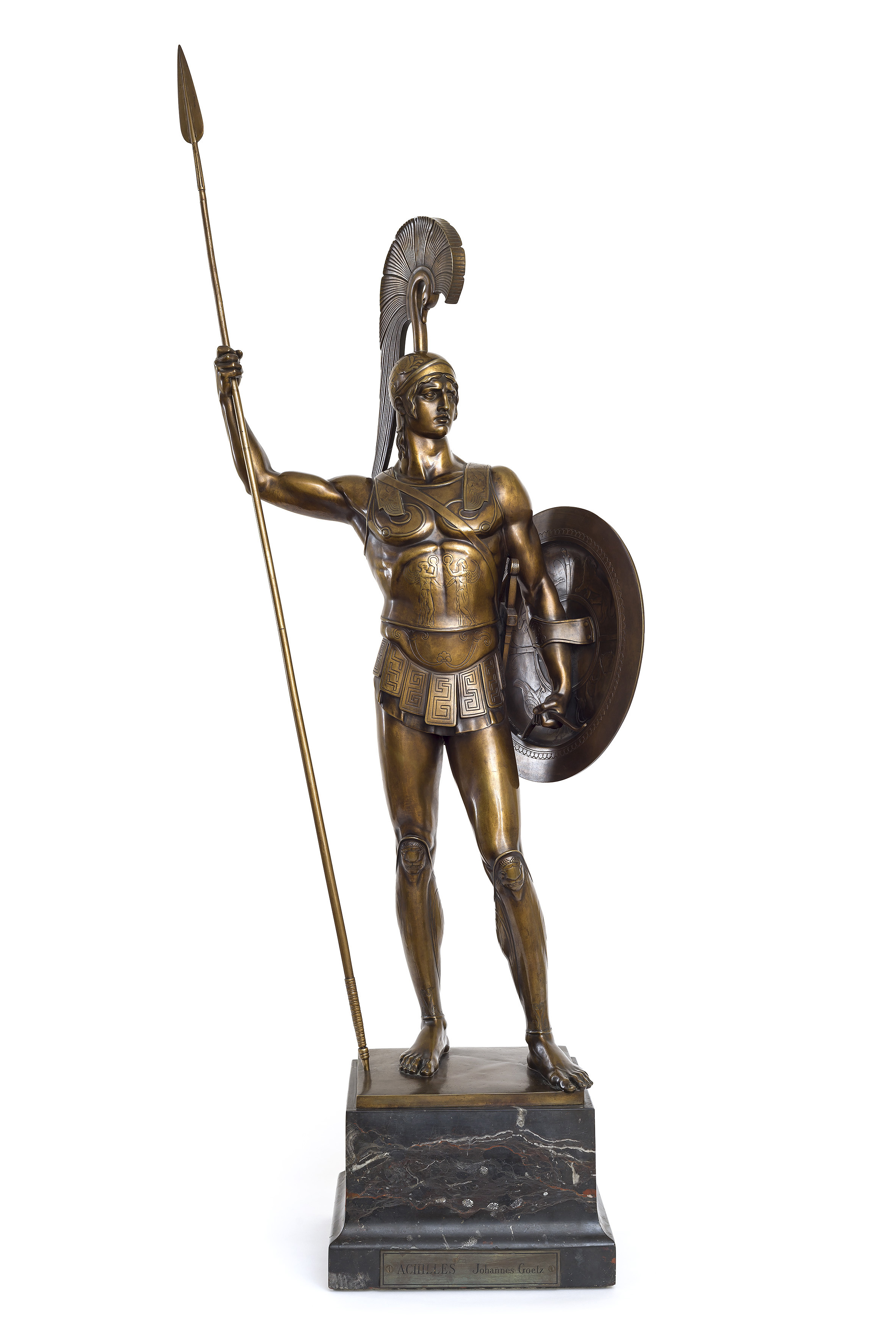 Der siegreiche Achilles von Johannes Götz. Bronze auf Marmorsockel, Höhe (mit Sockel) 124 cm, Am Sockel mit Ritzsignatur des Künstlers sowie Stempel der Giesserei Gladenbeck / Berlin Modell und Guss 1910